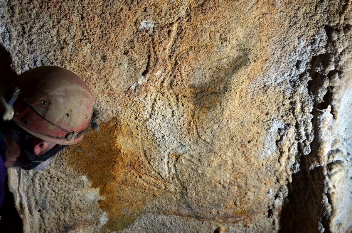 Goikolauko koba (Berriatua, Bizkaia). Ahuntzaren grabatua.